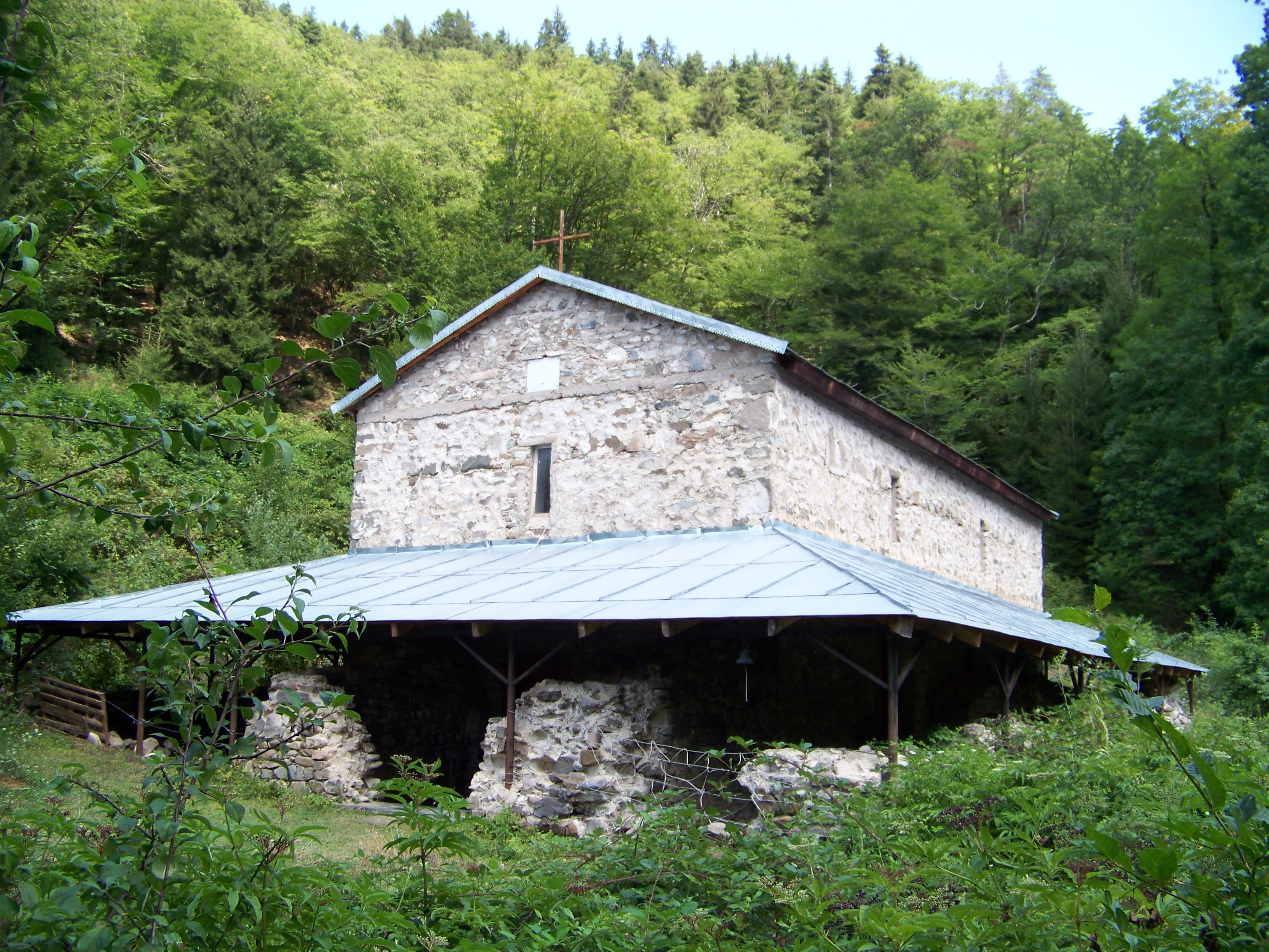 წმ. გიორგის ეკლესია